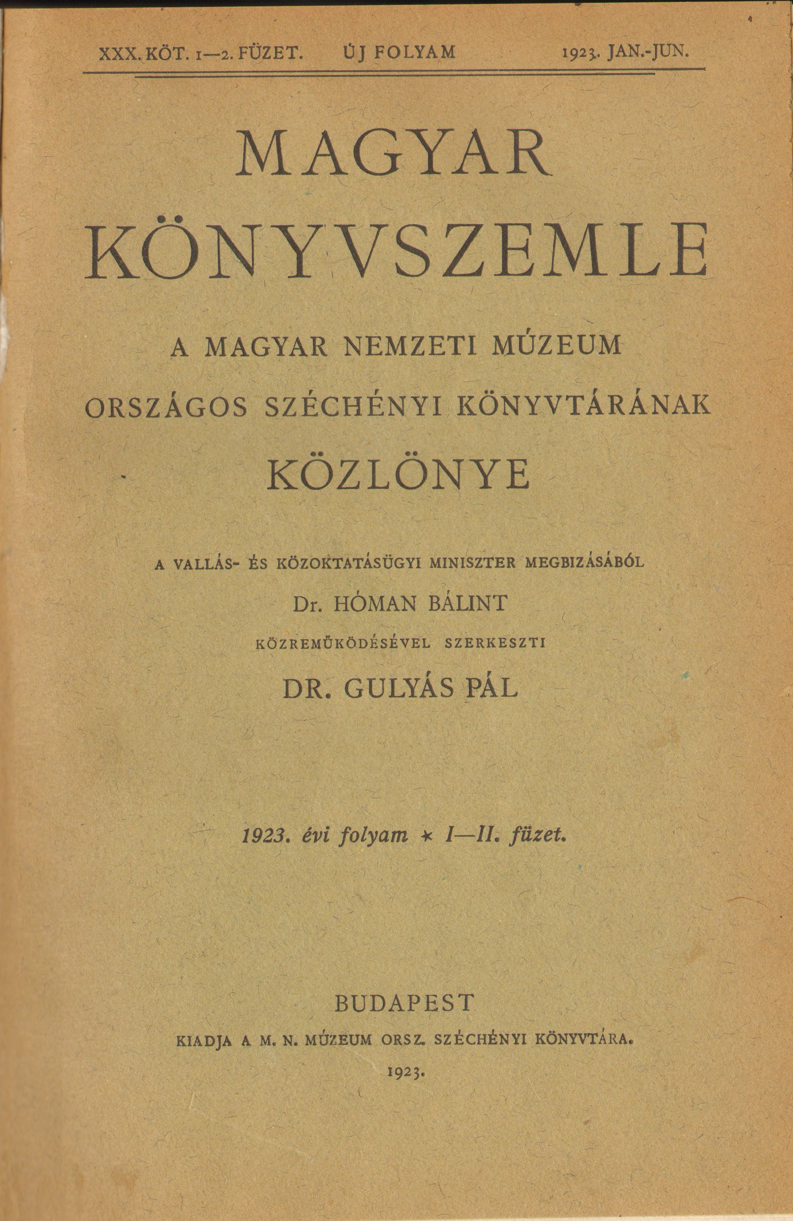 A Magyar Könyvszemle címlapja 1923-ból